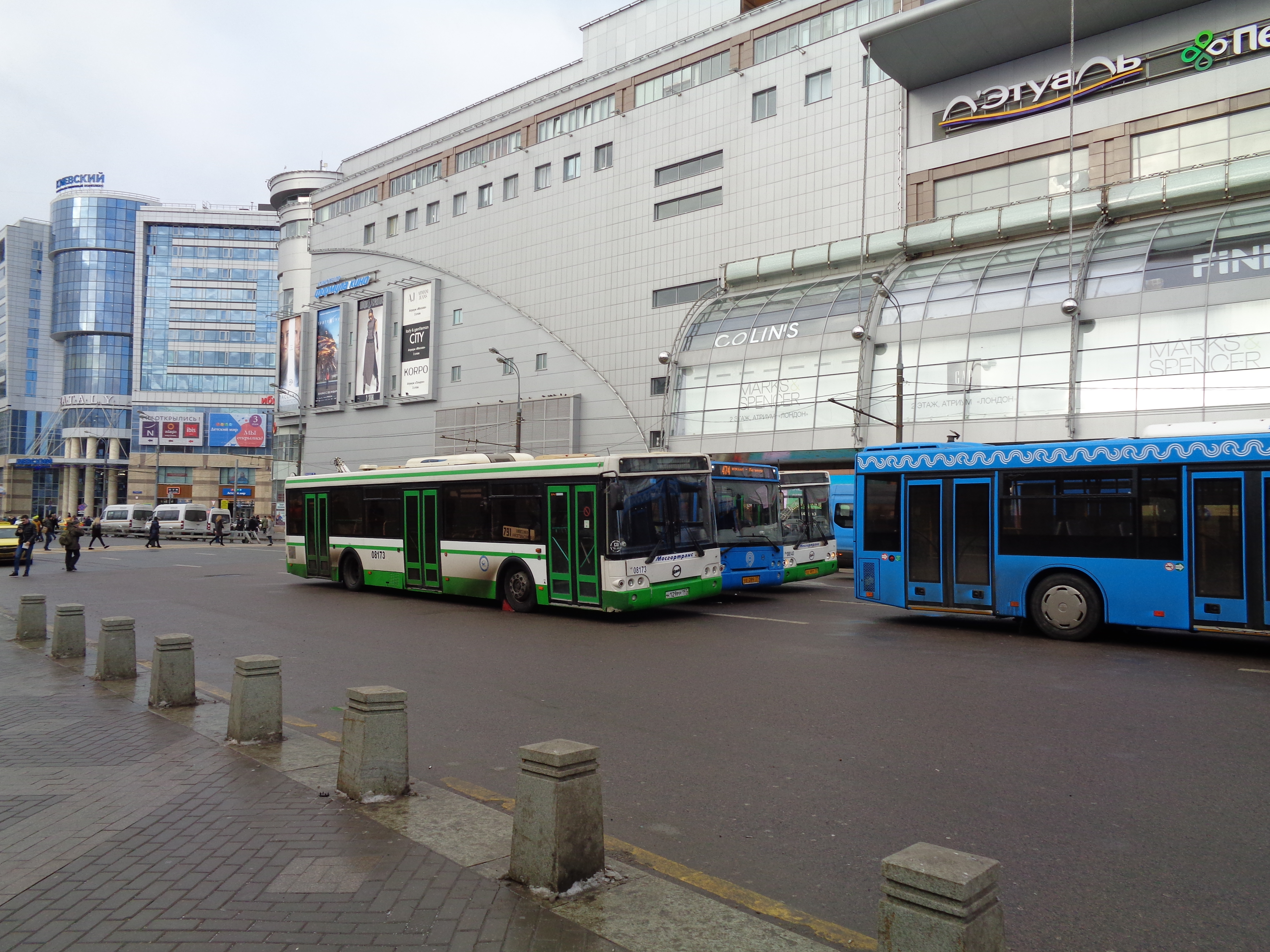 ЛИАЗ-5292, площадь Киевского вокзала